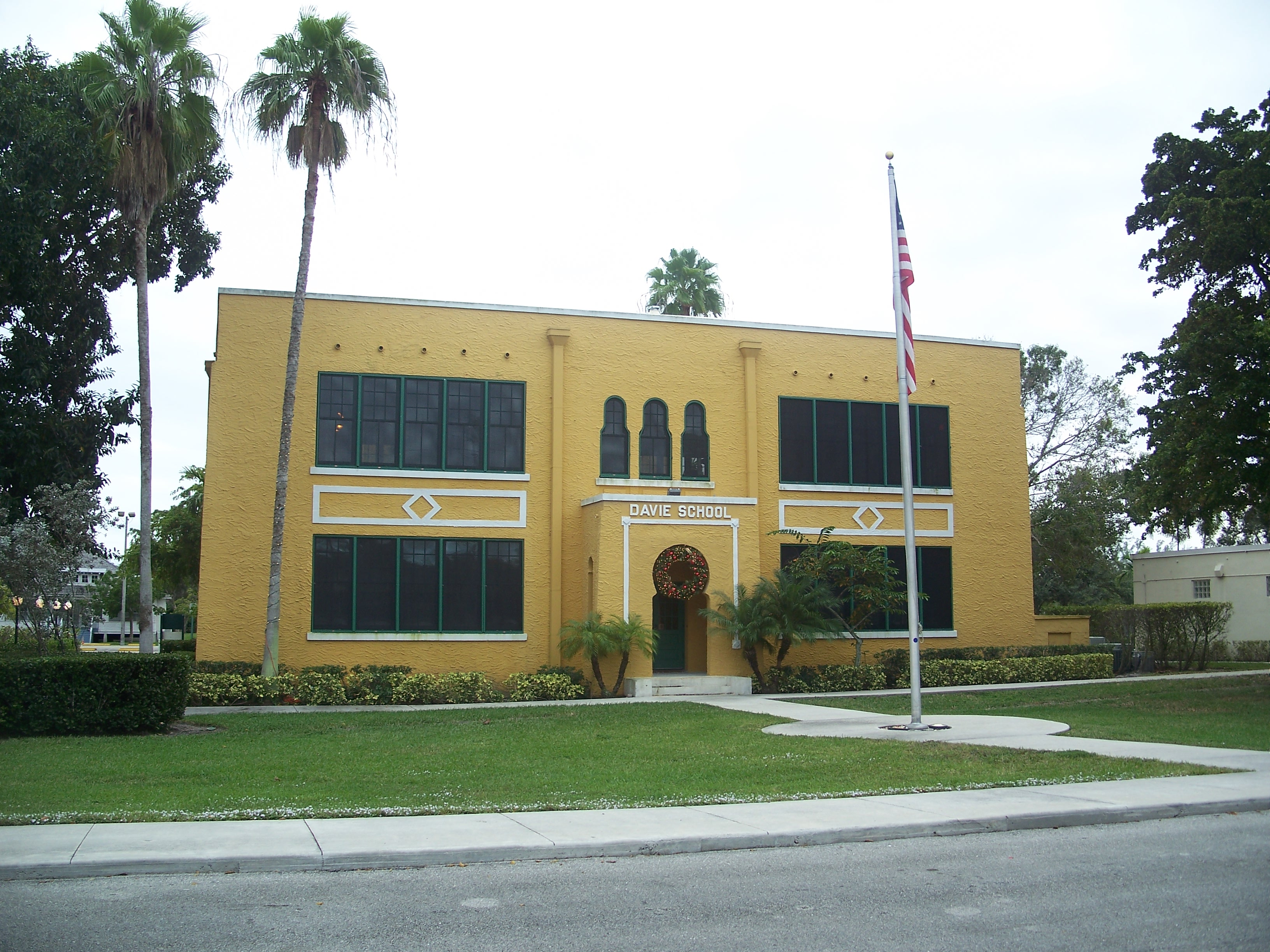 Davie, Florida: Davie School